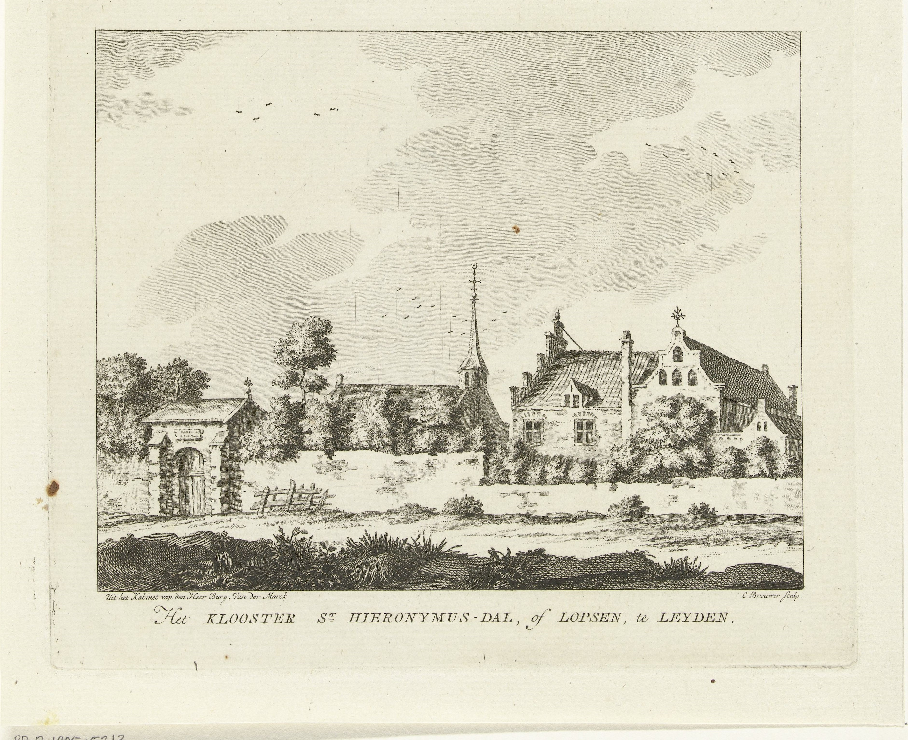 Gezicht op klooster Lopsen in Leiden. Dateert uit 1783, ruim 200 jaar na de sloop, dus moet op de fantasie gebaseerd zijn.